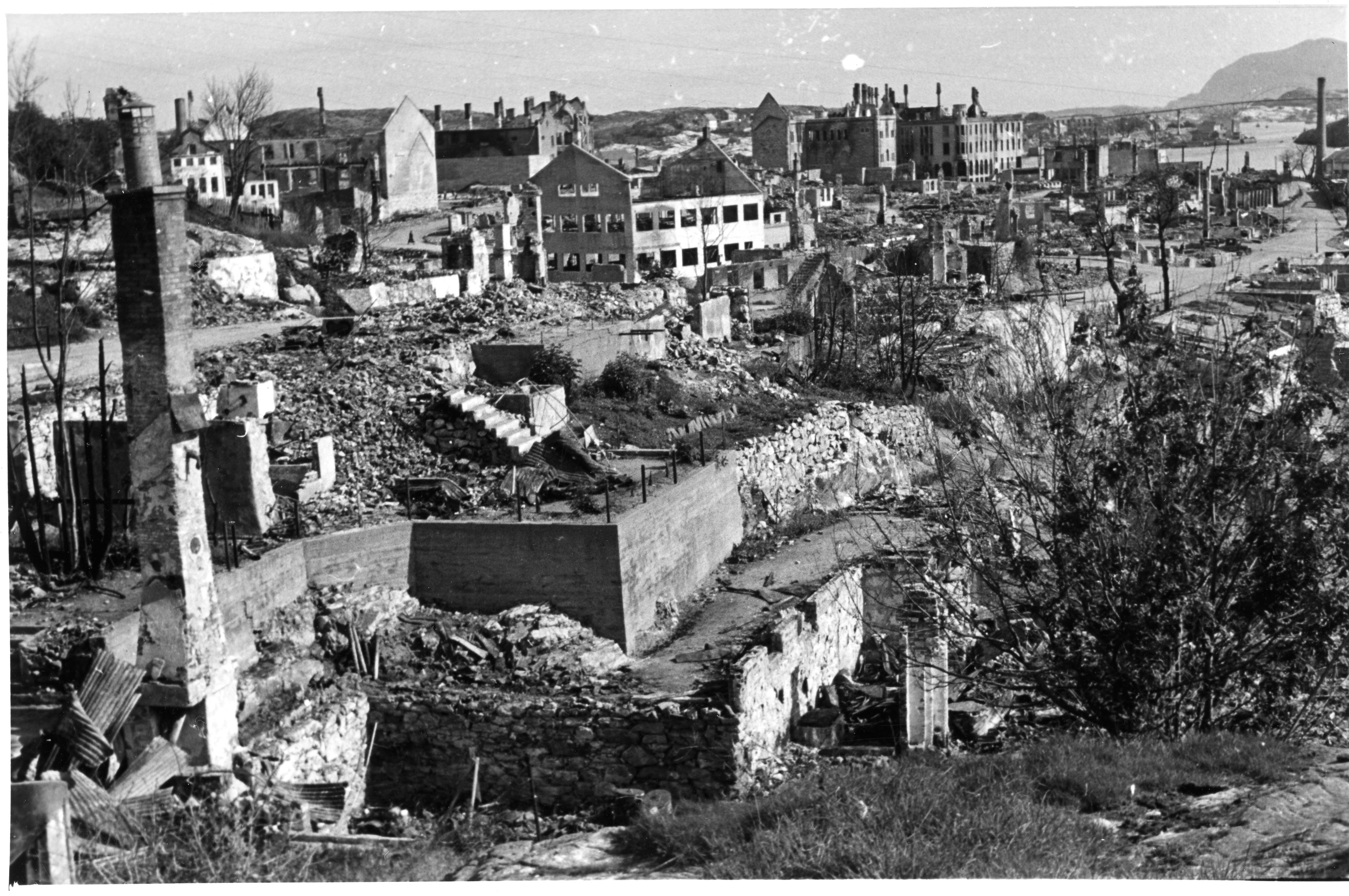 Bildet er hentet fra Arkivverket. Kristiansund i ruiner. Arkivinstitusjon : Riksarkivet Arkivnavn : Løken, Hallvard Sted : Norge, Møre og Romsdal, Kristiansund, Kristiansund Emneord: 2. verdenskrig, Andre verdenskrig Avbildet